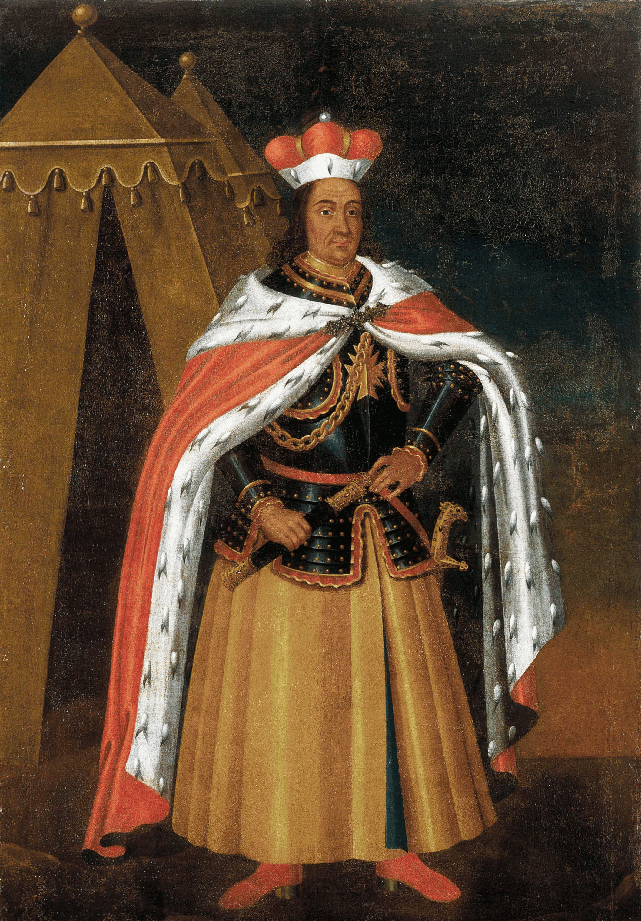 Беларуская (тарашкевіца): Партрэт Вітаўта Вялікага (Vitaŭt Vialiki. Вітаўт Вялікі ) з кляштару аўгустынаў у Берасьці.